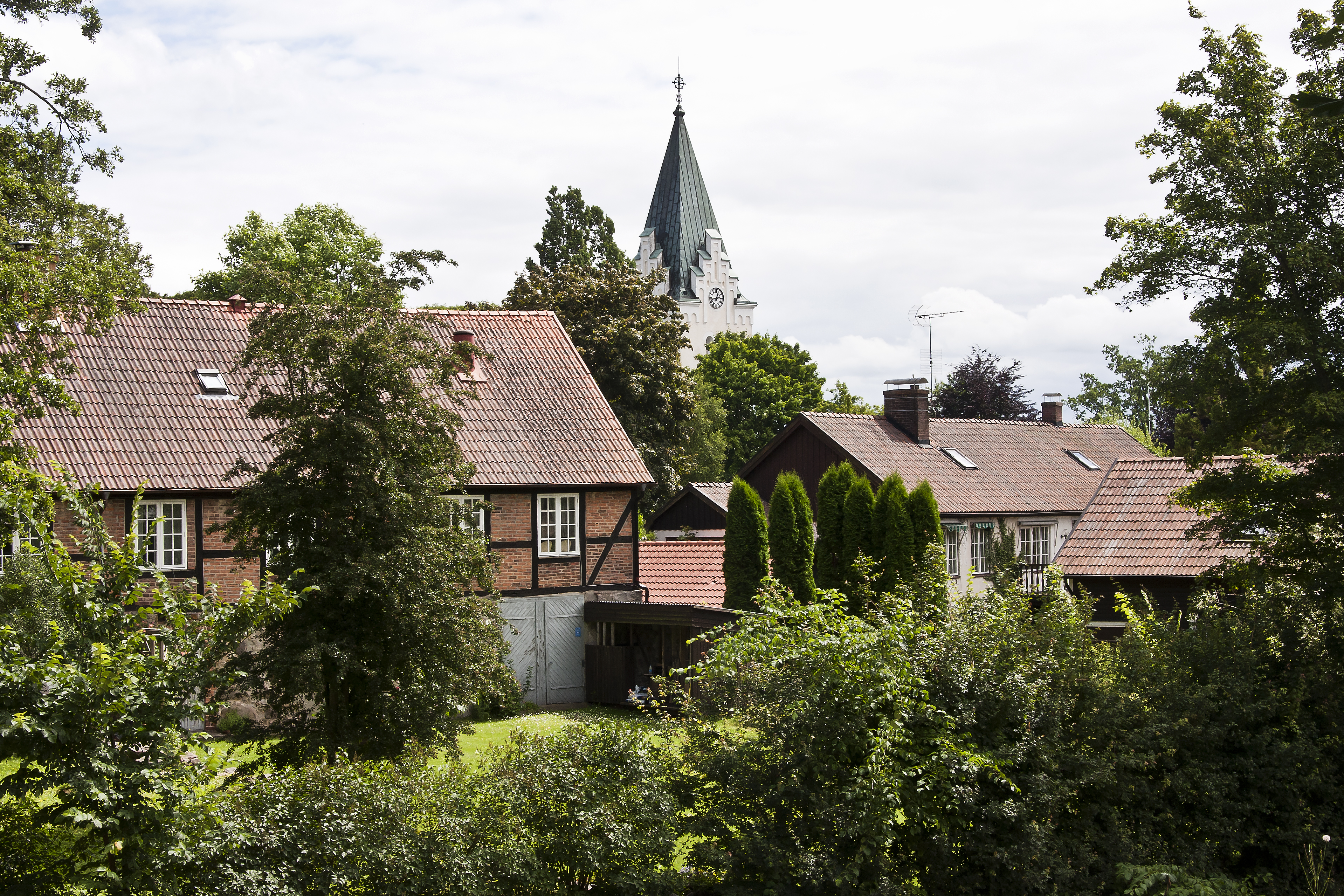 Bebyggelse i Höör med Höörs kyrka i bakgrunden.